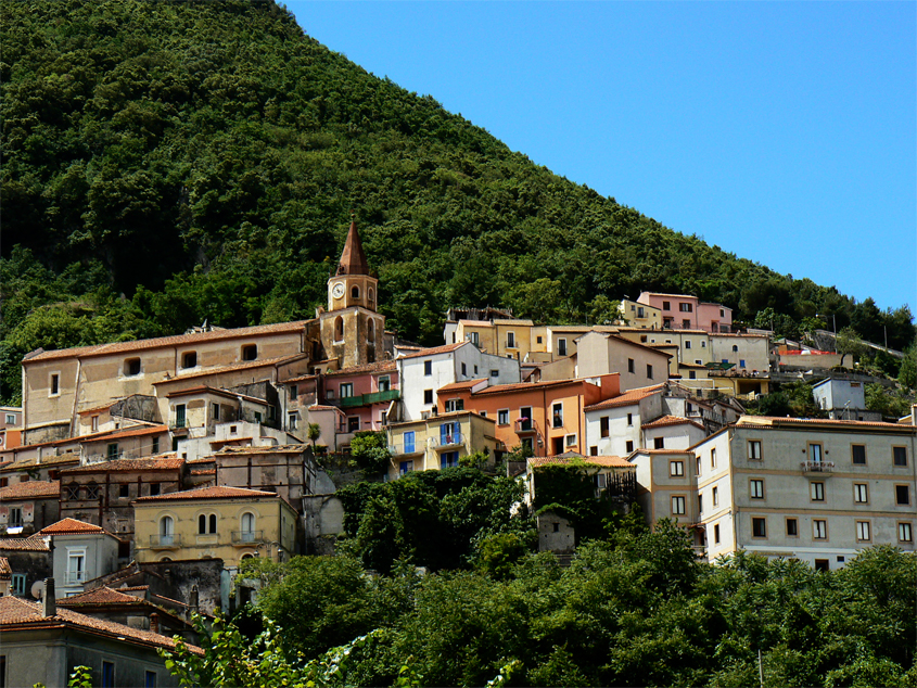 Maratea, Basilicata, ItaliaMaratea